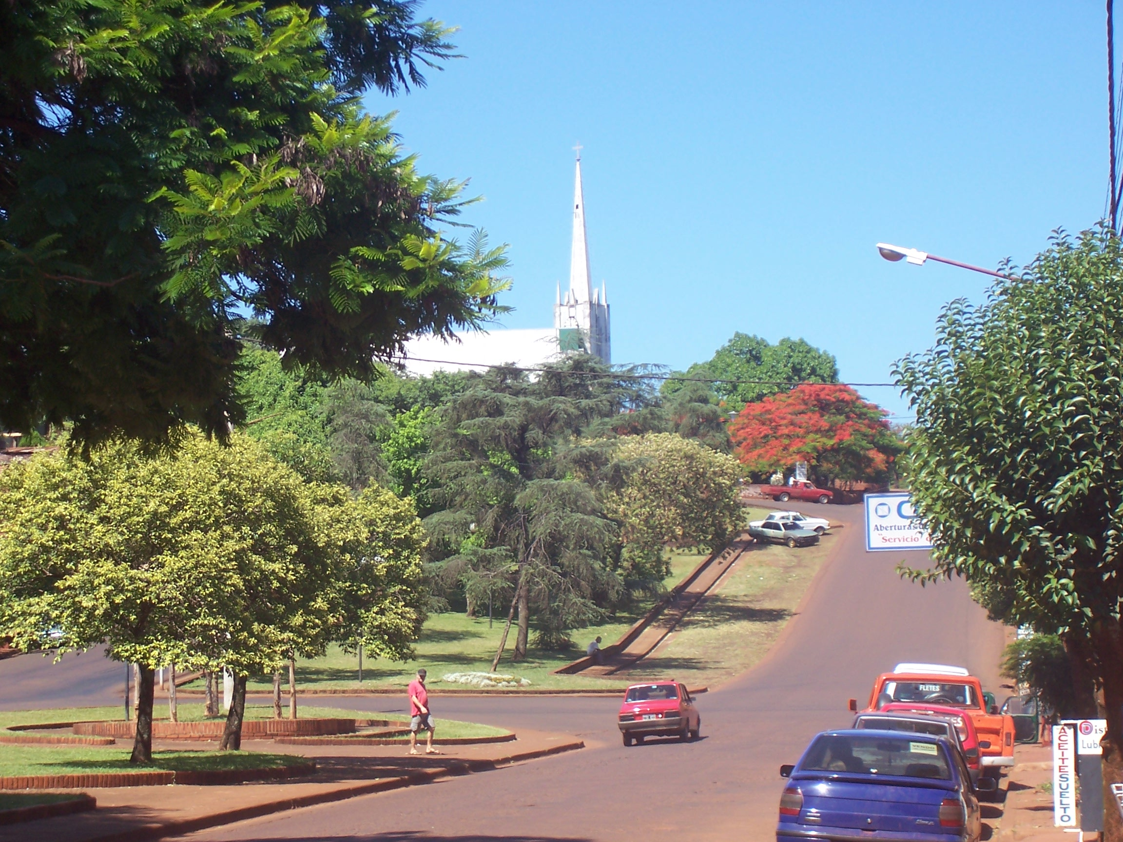 Imágen de la Avenida Sarmiento en dirección hacia el Centro de Oberá, Misiones en Argentina.